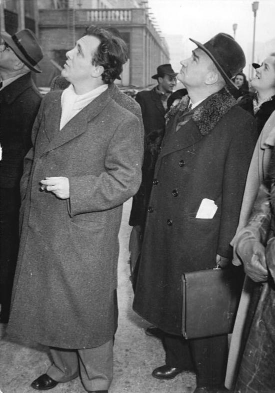 Zentralbild Krueger 20.1.1953 Minister der Volksrepublik Polen besichtigt die Stalinallee in Berlin Der Minister für Kultur und Kunst der Volksrepublik Polen, Sokorsky, der zu Vereinbarungen über den kulturellen Austausch im Jahre 1953 innerhalb des deutsch-polnischen Kulturabkommens in Berlin weilt, besichtigte am 20.1.1953 die Bauten in der Stalinallee. Prof. Henselmann, dessen Kollektiv für die Gestaltung der Stalinallee mit dem Nationalpreis ausgezeichnet wurde, führte den polnischen Gast durch die erste sozialistische Straße der Hauptstadt Deutschlands. UBz: (von rechts nach links) Minister Sokorski und Prof. [Hermann] Henselmann vor Block C-Süd